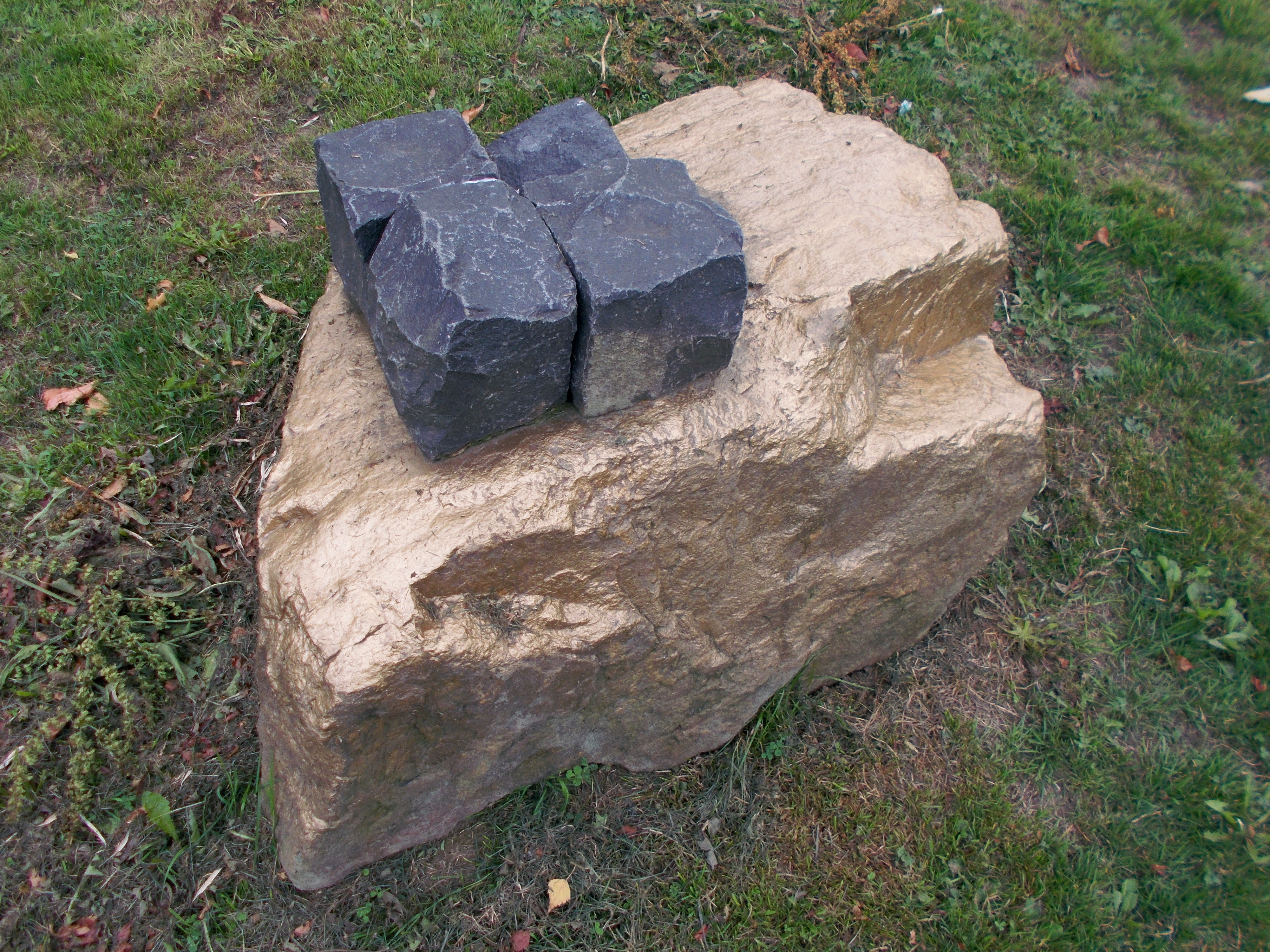 Zu Ehren Emil von Behring gestaltete 2013 die Mülheimer Künstlergruppe "AnDer" e. V. den Von-Behring-Platz. Skulptur "Stein der Plätze" von Dore O. Nekes.